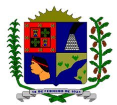 escudo de Guarenas Municipio Plaza Estado Miranda Venezuela